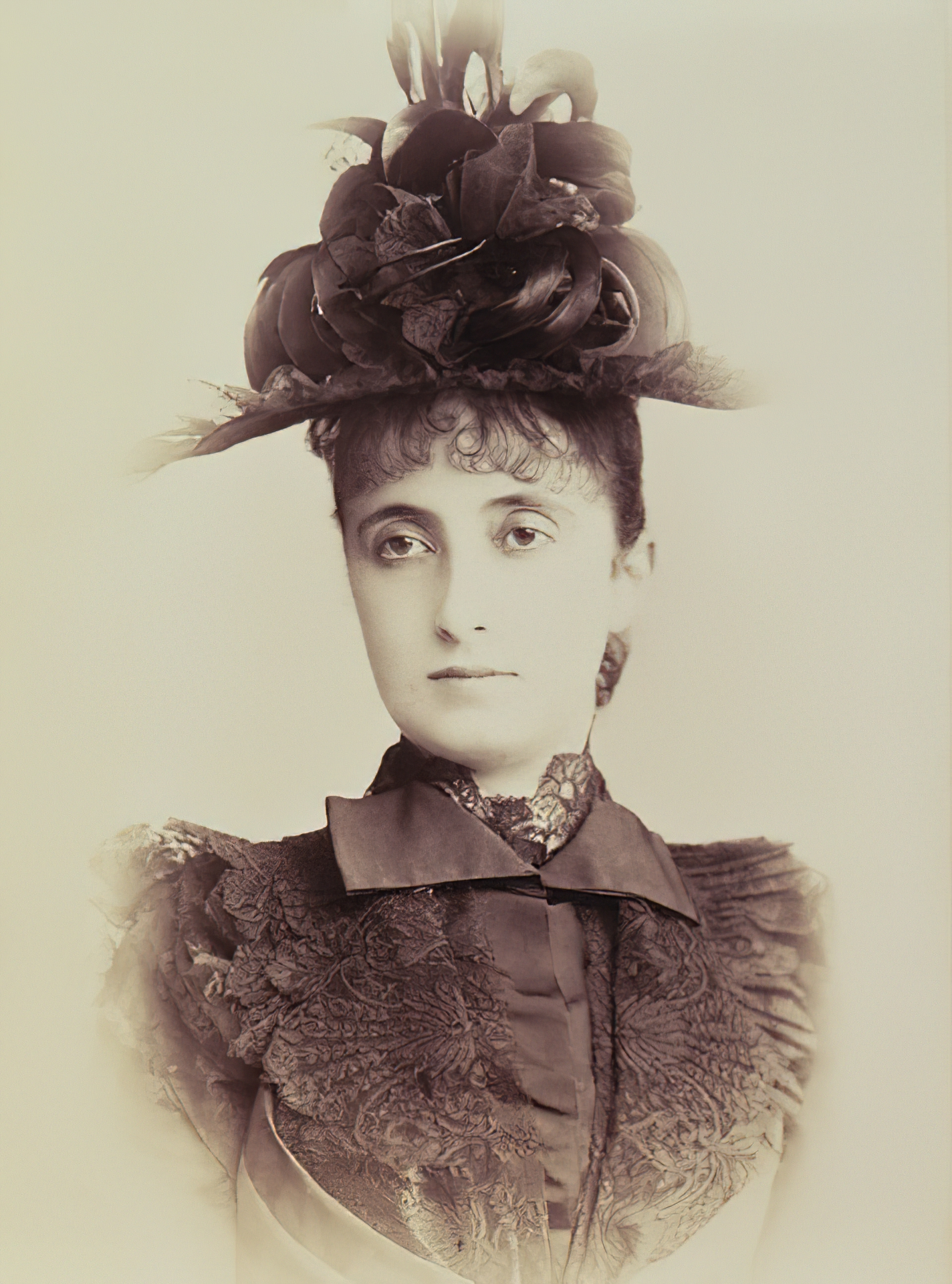 Adele Strauss, née Deutsch (1856-1930); spouse of Johann Strauss II (1825-1899)